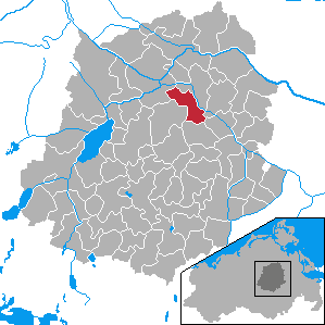 Utzedel, Landkreis Demmin, Mecklenburg-Vorpommern